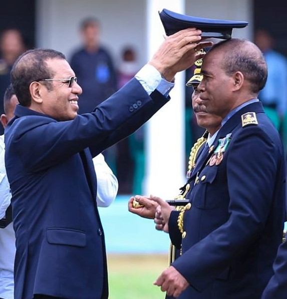 Cerimónia do 19.º Aniversário da Polícia Nacional de Timor-Leste, designação da Mateus Fernandes